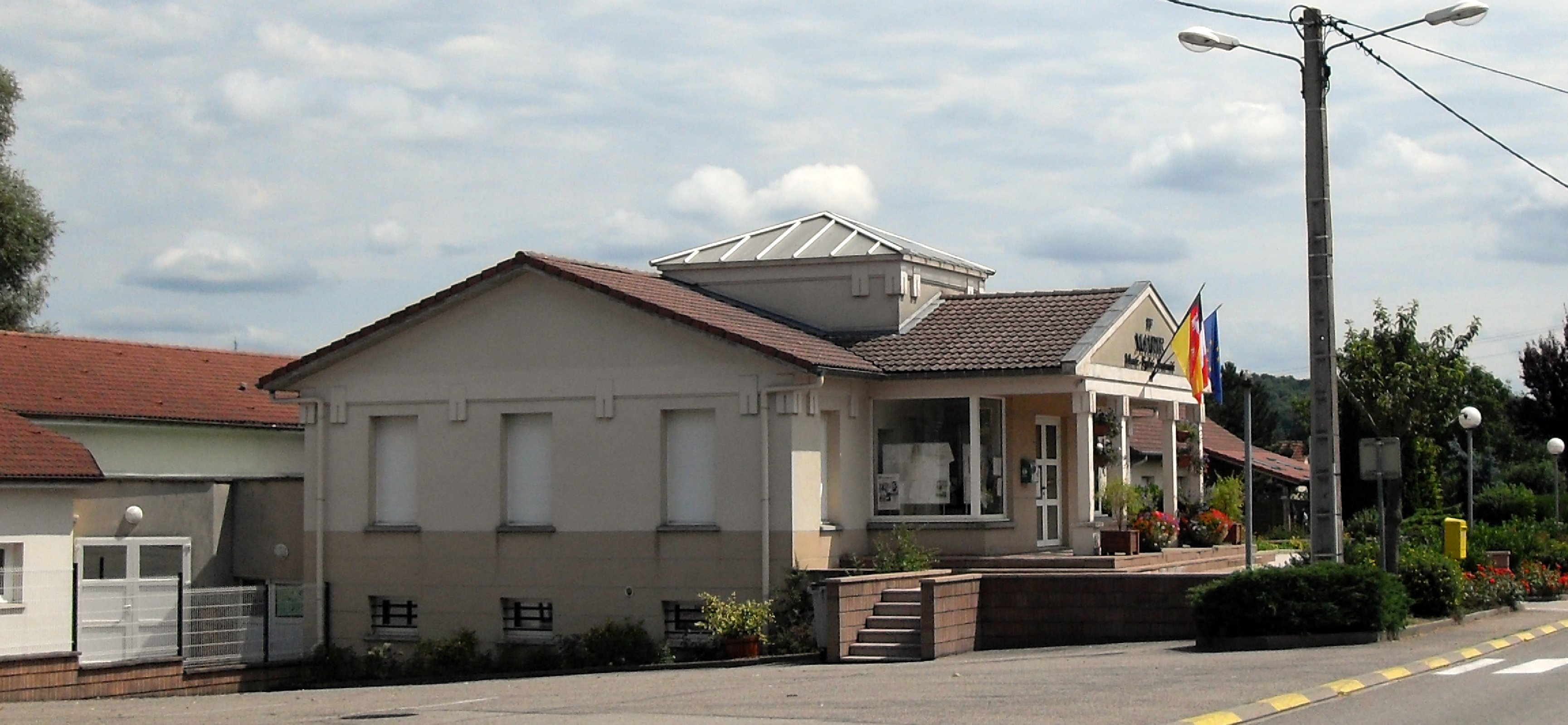 La mairie-école de Florémont